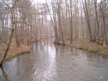 Buckau: Unterlauf im Herbst